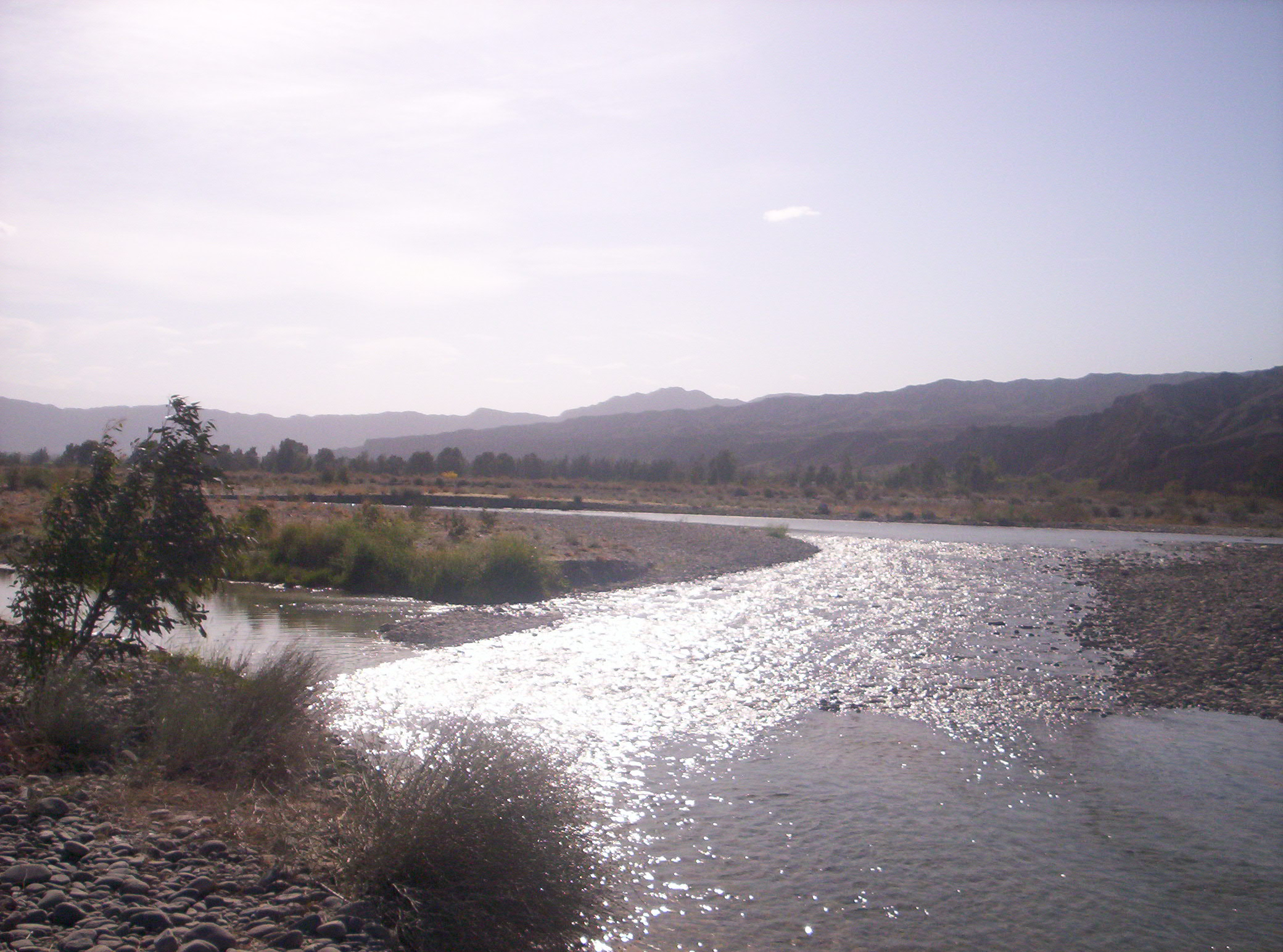 Vista del Río San Juan recorriendo parte del departamento Chimbas, en la provincia de San Juan, Argentina